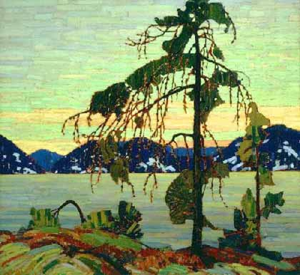 Le Pin